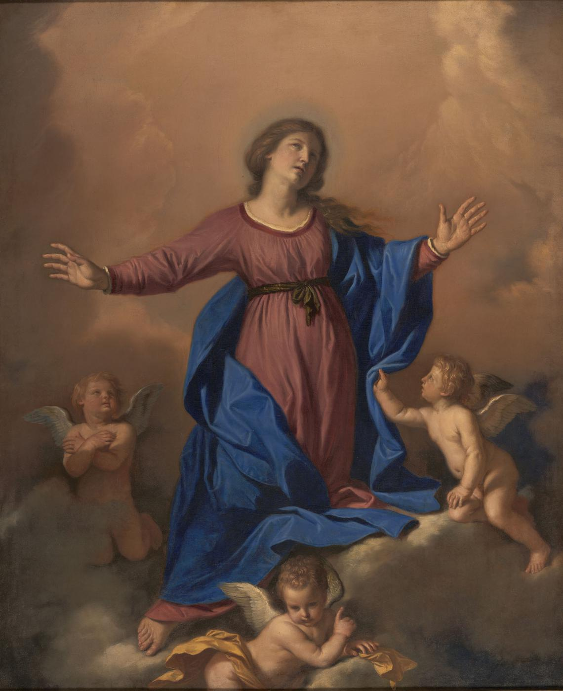 Guercino Assunzione Vergine olio su tela 116.6 x 95.2 cm Ackland Art Museum